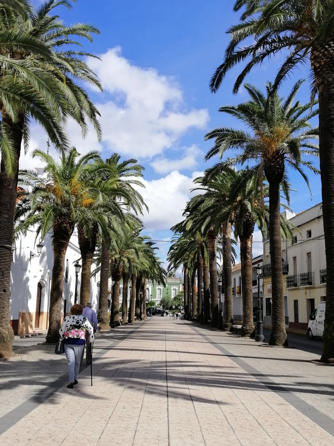 Imagen del Paseo de las Palmeras, en Oliva de la Frontera (Badajoz)